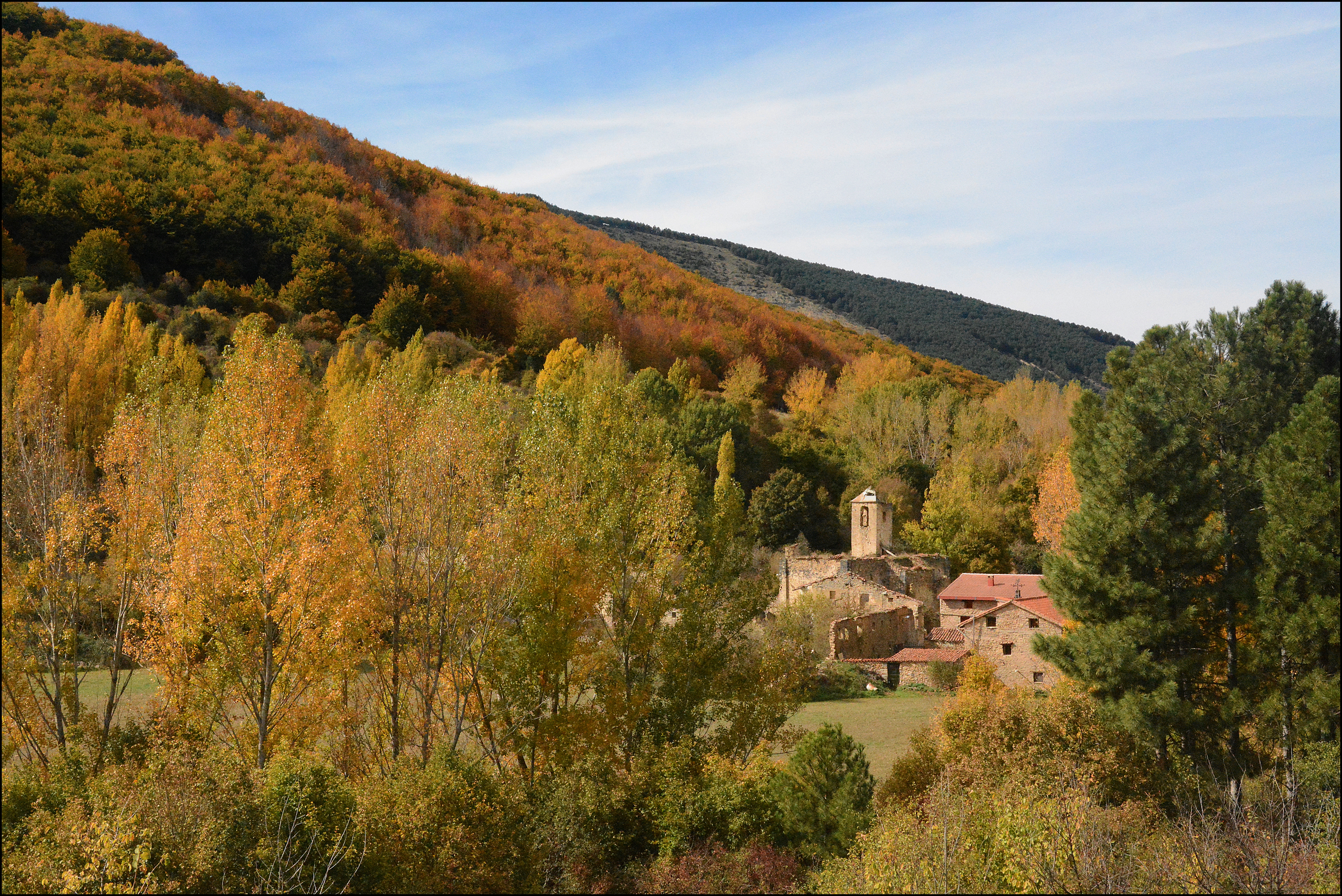 Camporredondo. Soria.